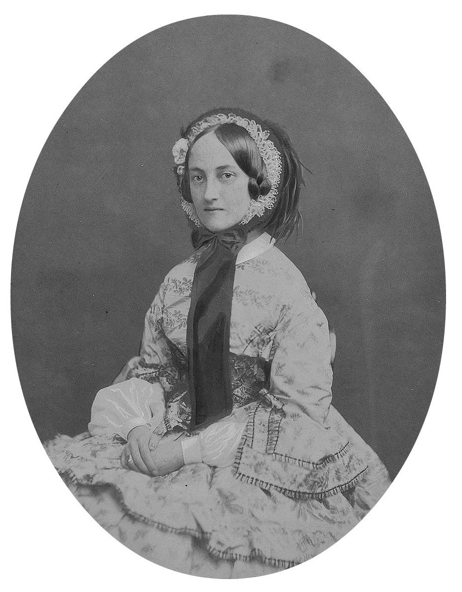 Анна Дмитриевна Строганова, ур. Бутурлина (1828—1906)